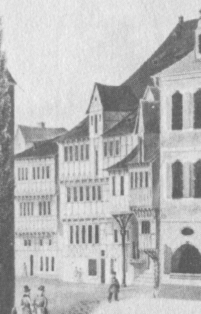 Blick vom Markt in die Breite Straße in Quedlinburg, Ausschnitt aus einer Zeichnung von 1873